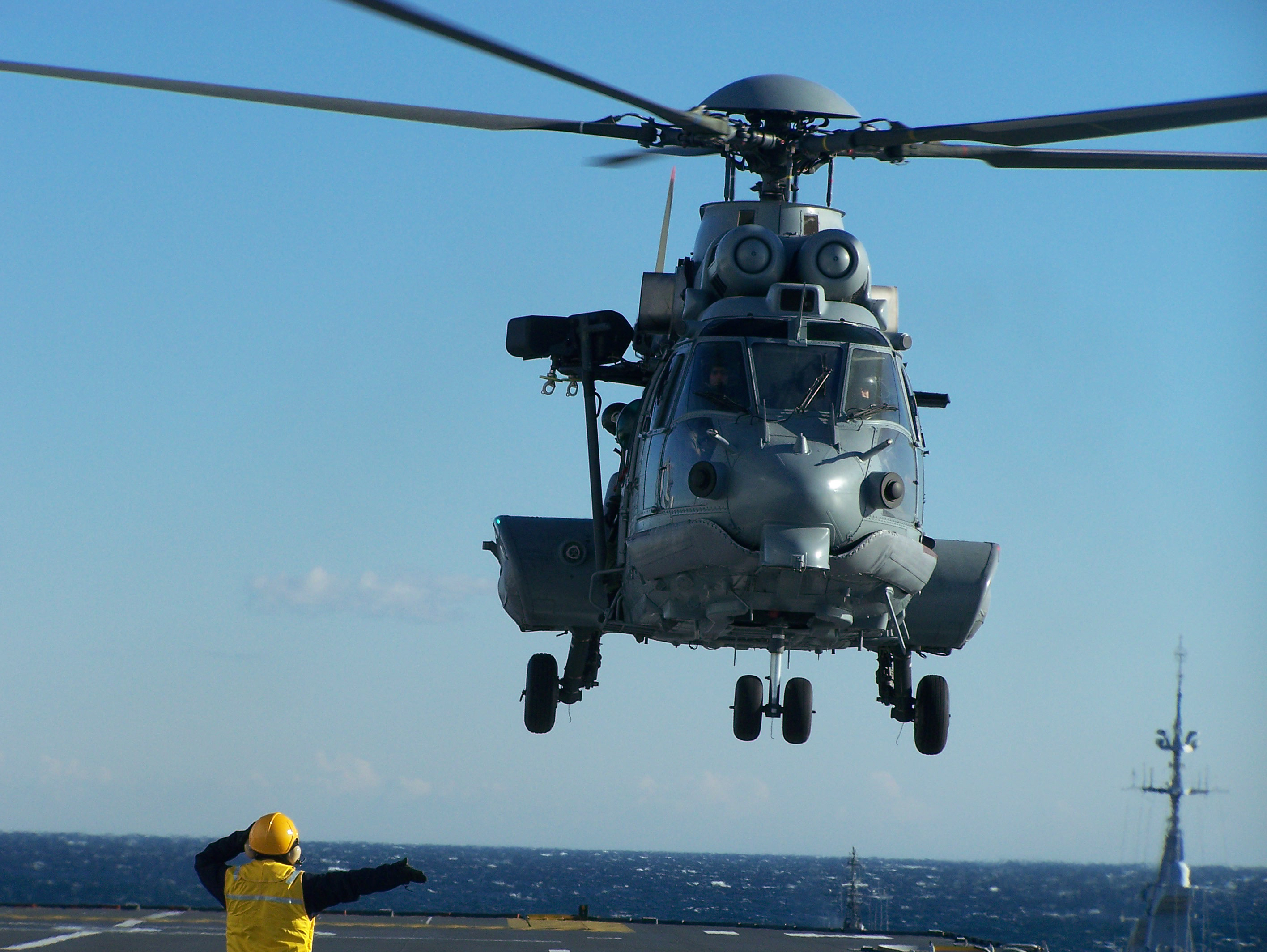 Décollage d'un Caracal de l'Armée de l'Air, du BPC Mistral, lors des présentations communes terre-air-mer 2009.